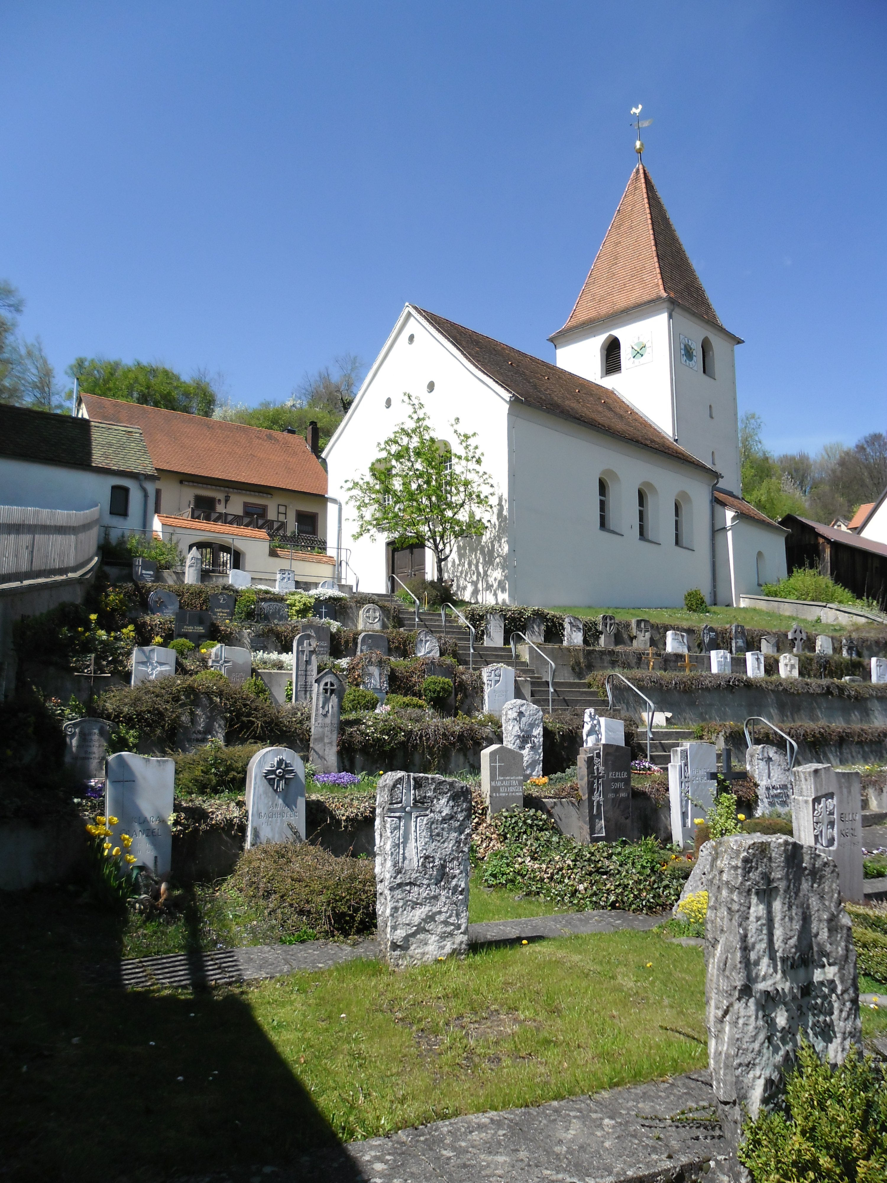 Die Pfarrkirche "Zur Heiligen Dreifaltigkeit" in der Engelgasse in Sulzbürg vom Friedhof aus gesehen